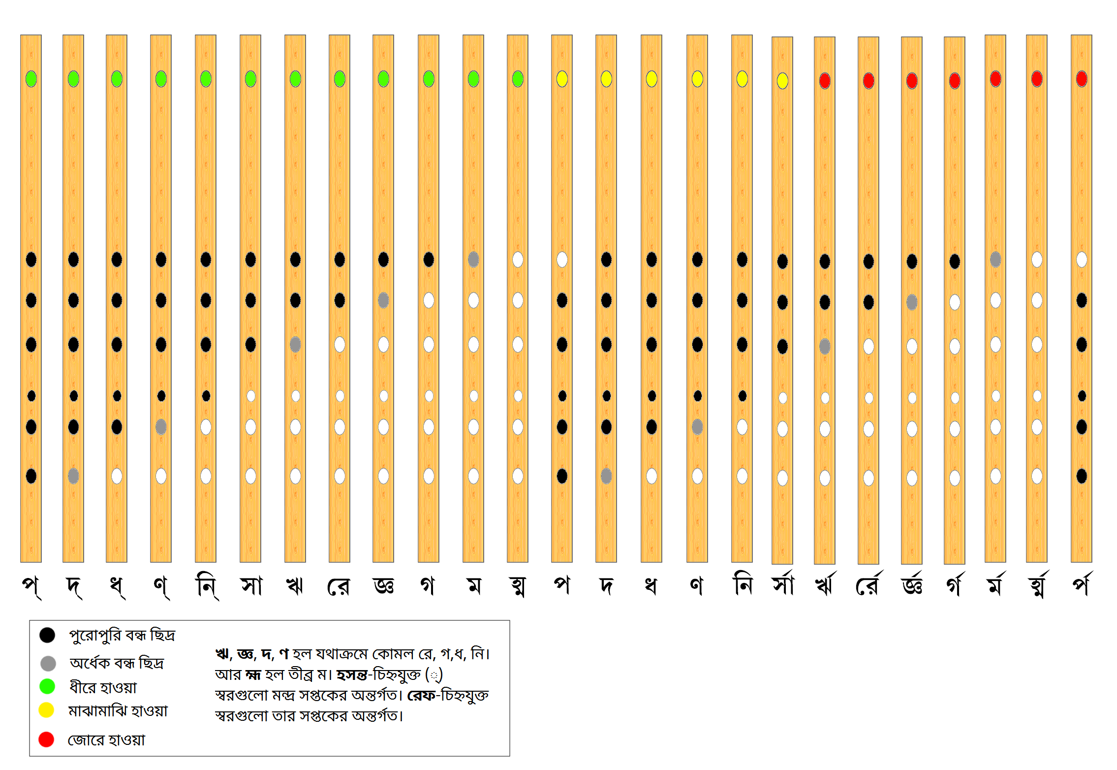 বাঁশিতে আঙুল রাখার মাধ্যমে সুর তৈরি করার তালিকা।